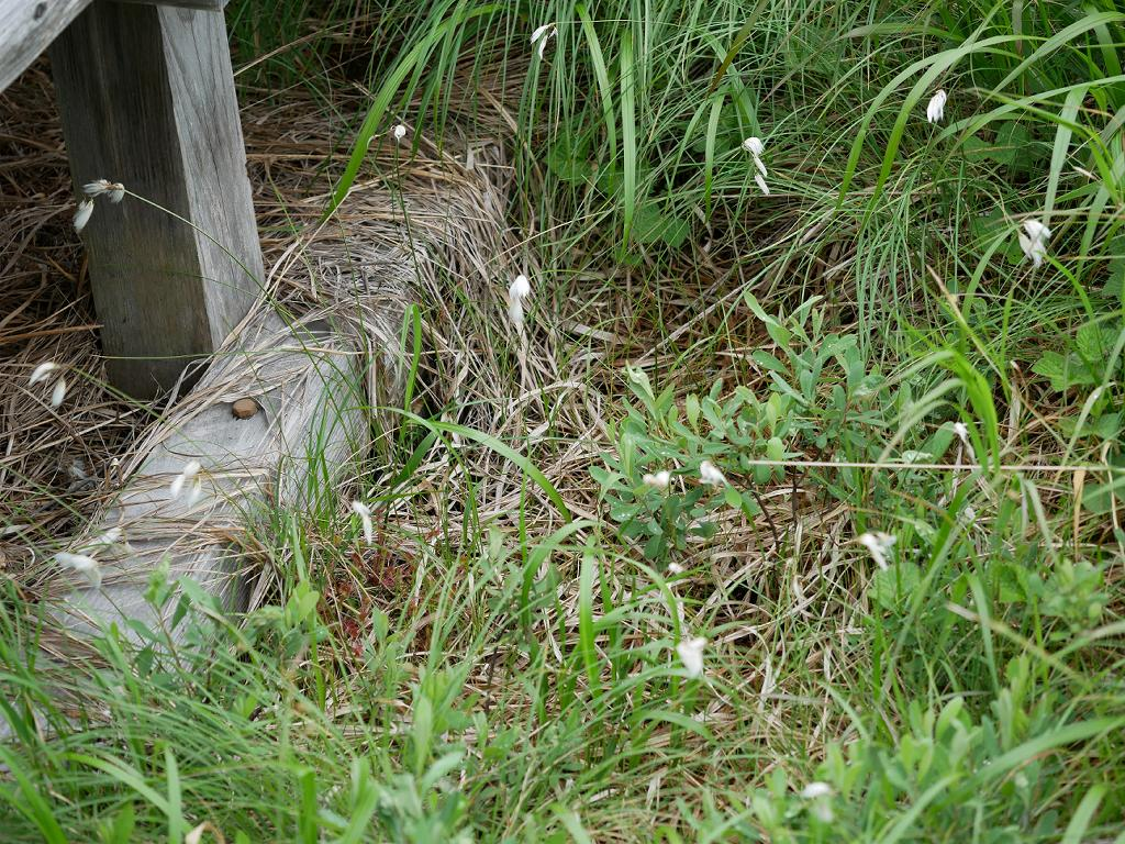 2019/06/29 北海道サロベツ原野：Hokkaido, Japan